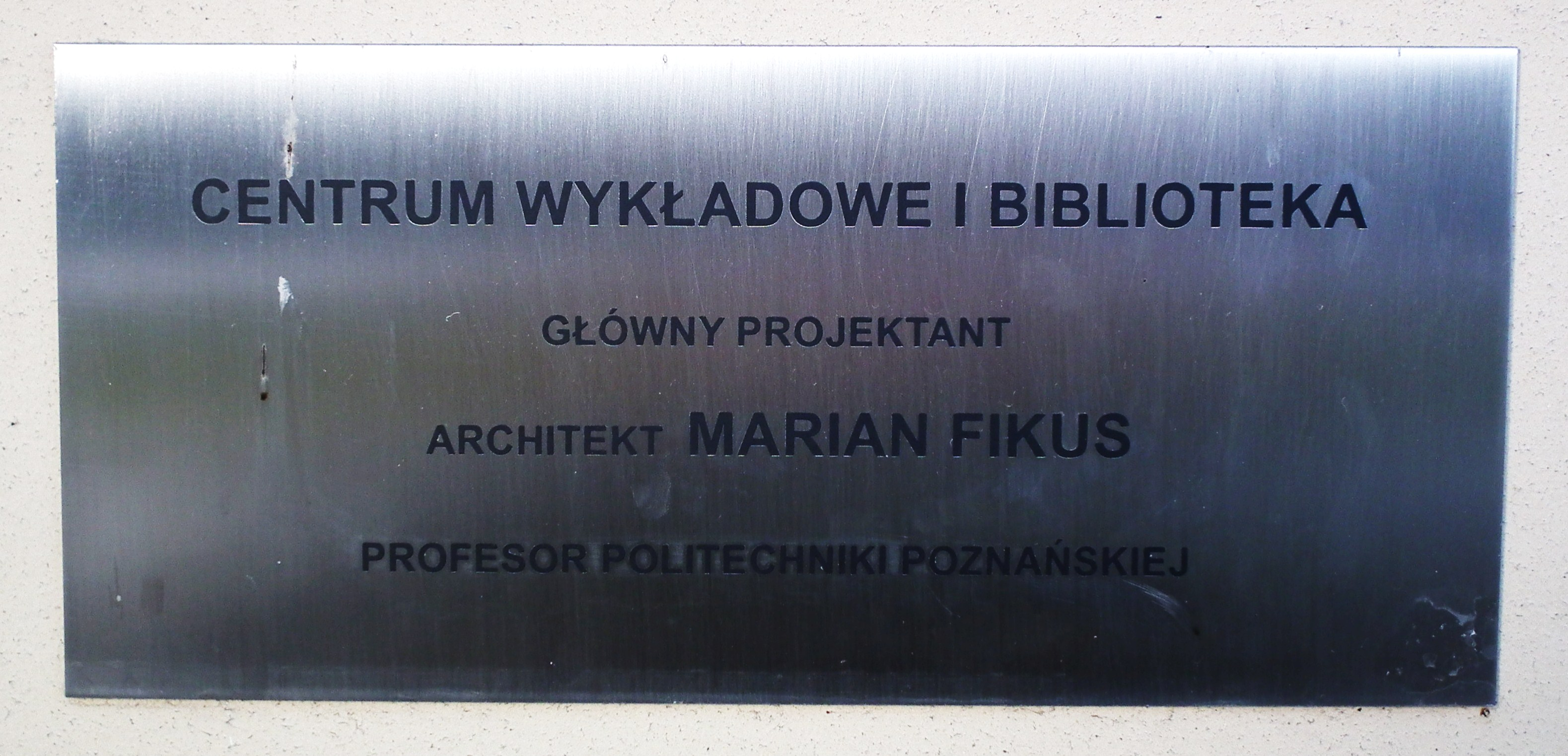 Politechnika Poznańska - tablica Fikusa.